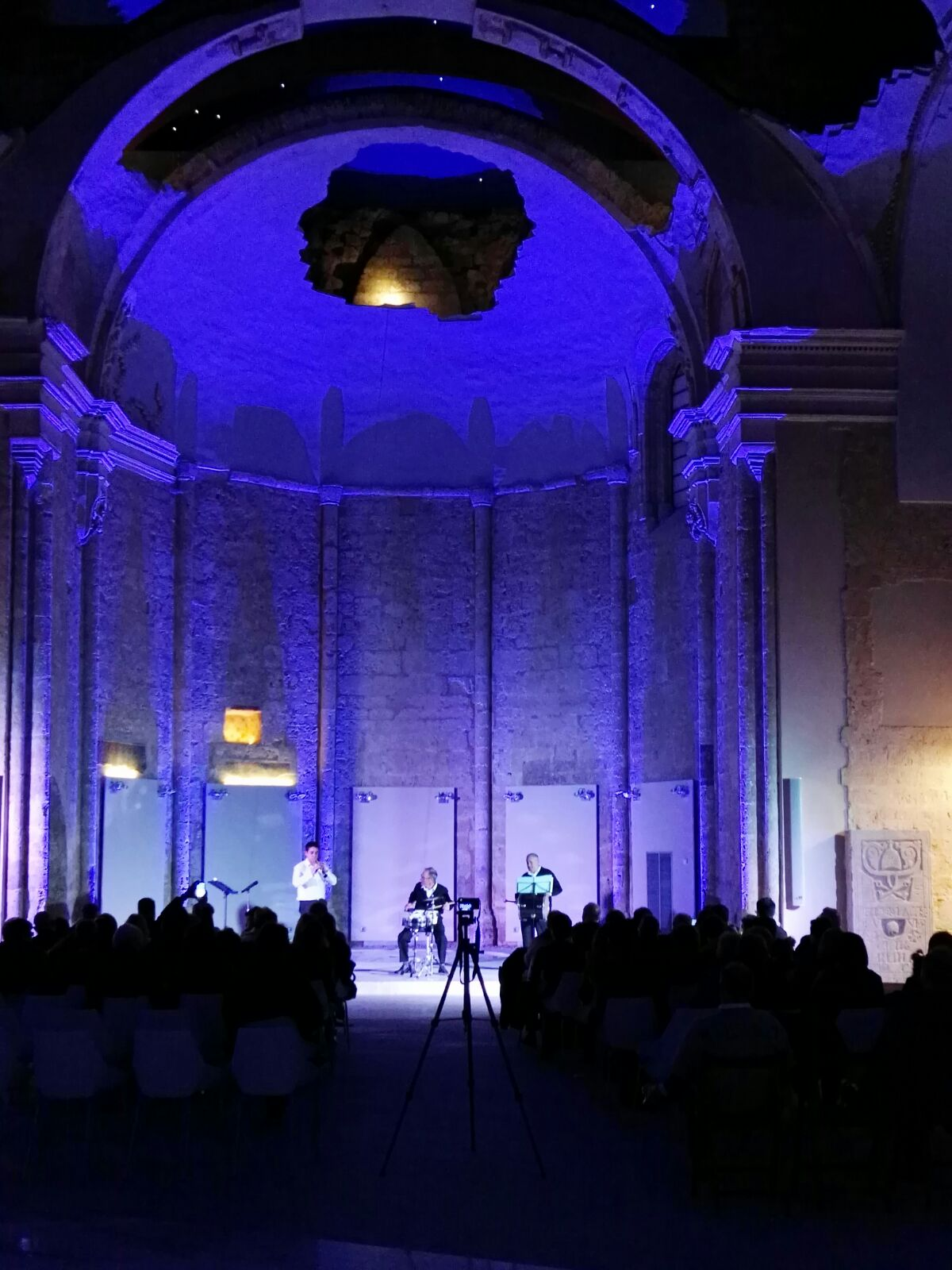 Fotografía de San Pedro Cultural (Becerril de Campos, Provincia de Palencia, España). Concierto 18/02/2017